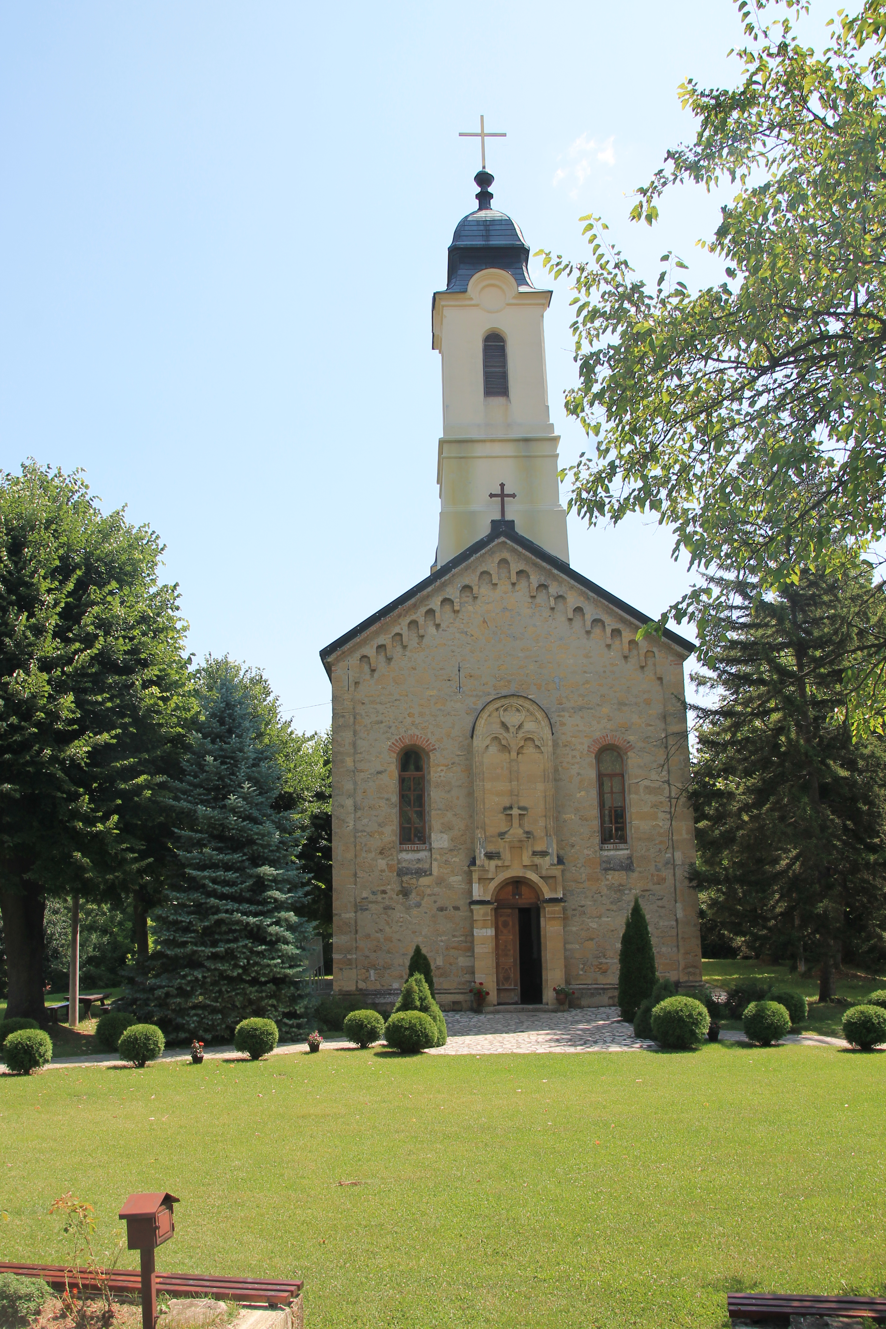 Crkva Sv. Petra i Pavla (Nemenikuće)